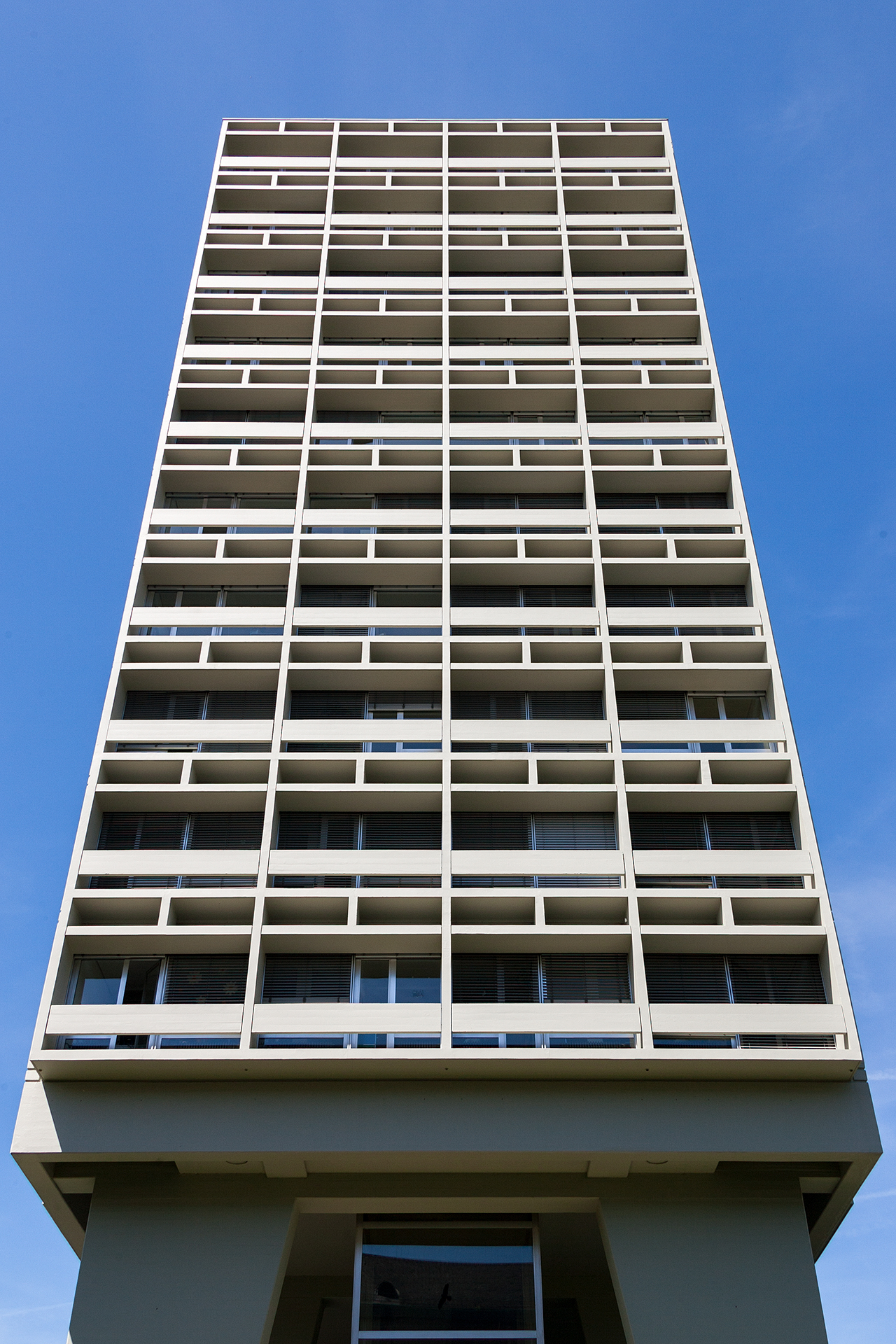 Stadthaus in Olten (SO): Stadtrundgang Objekt 1: Der Sitz der Stadtverwaltung wurde von 1963 bis 1965 nach den Plänen der Architekten Frey, Egger & Peterhans, Solothurn und Bern erbaut und seit 1992 etappenweise renoviert.